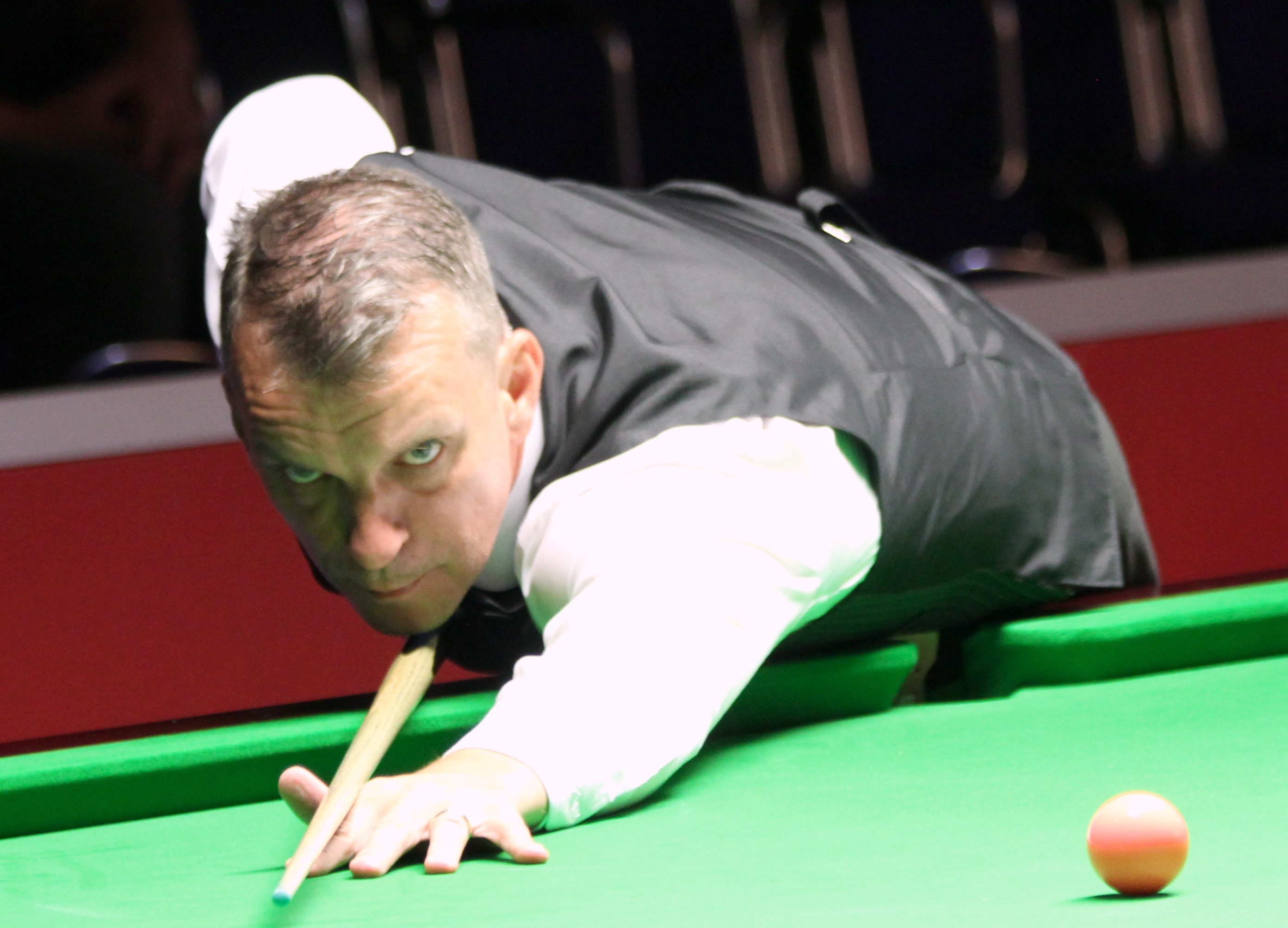 Mark Davis beim Paul Hunter Classic 2016